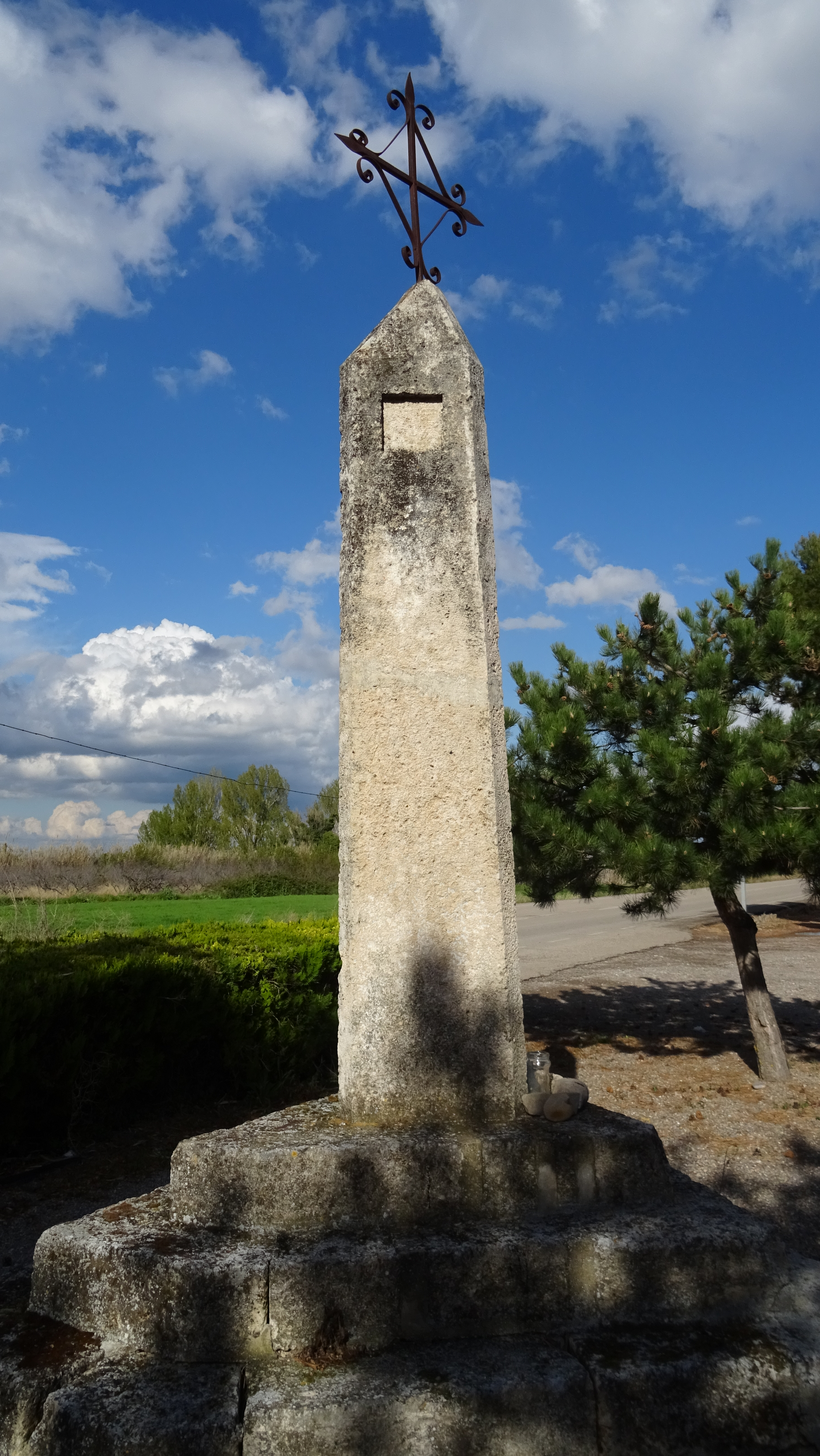 Aragonés: Cruz d'a Santisma Trinidat en Magallón